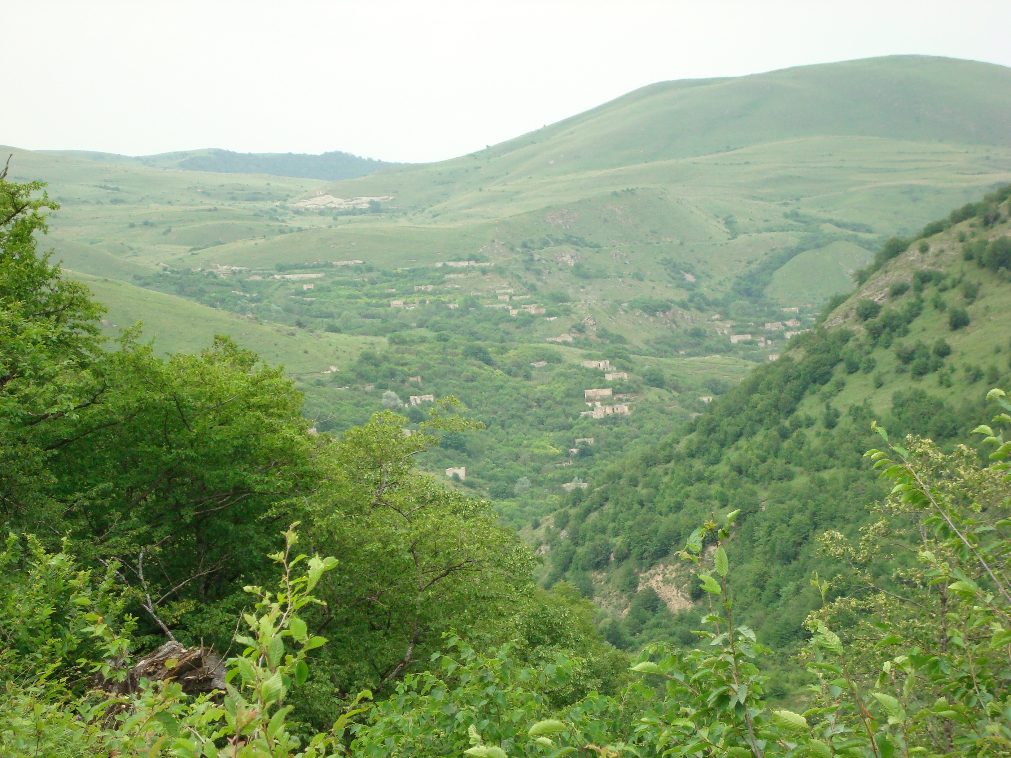 Գյուլիստան գյուղի Շահումյանի շրջանում